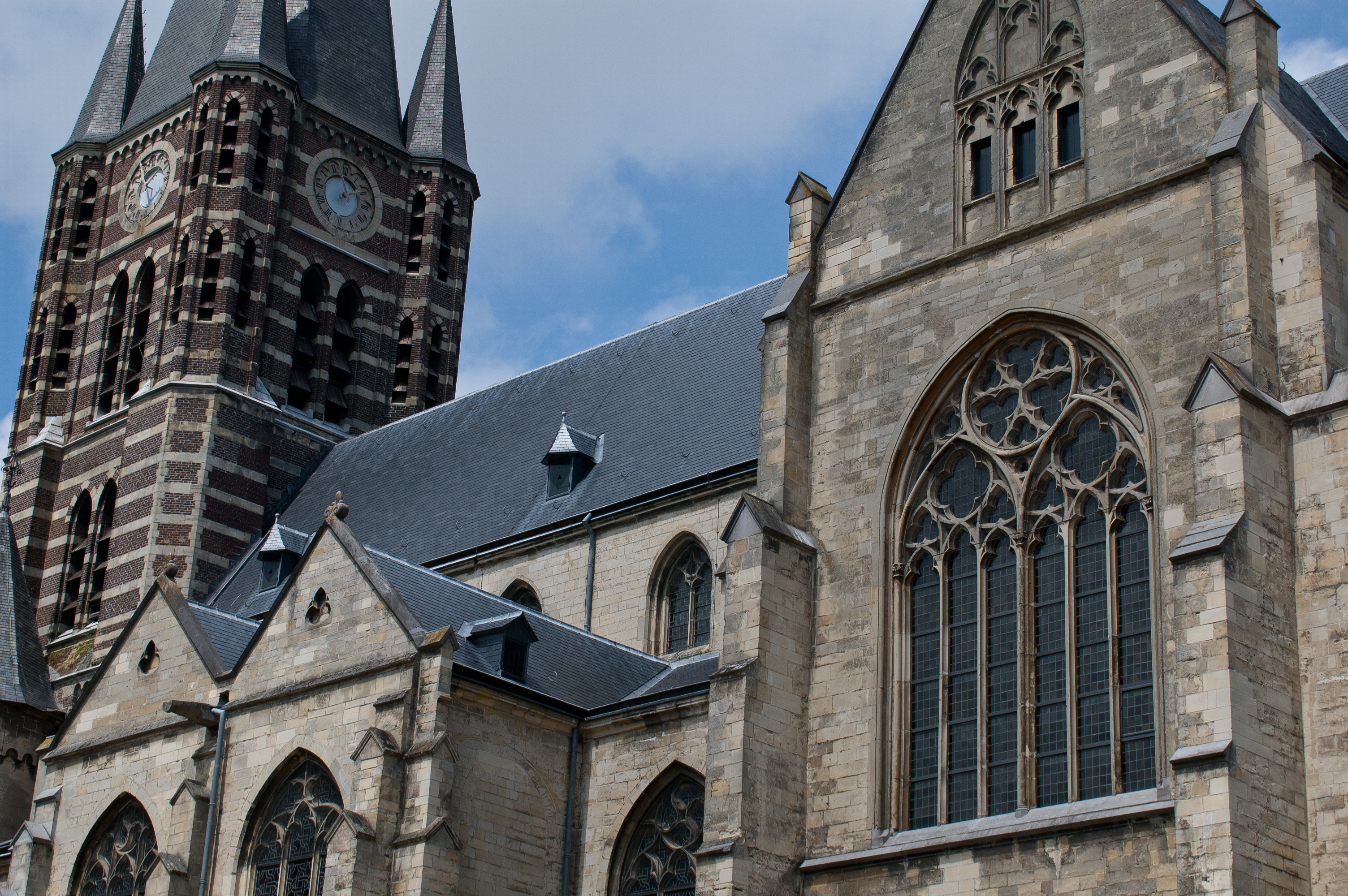 Ein Hochblick auf die Südseite der Abteikirche St. Michael in Thorn, Niederlande